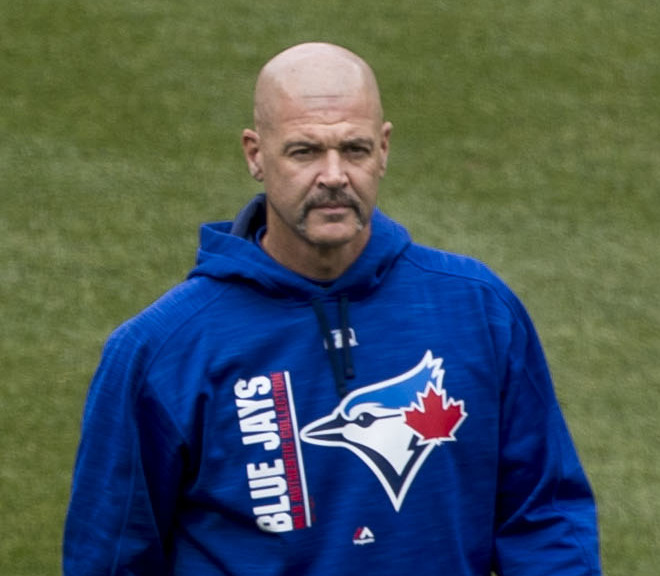 Blue Jays at Orioles 5/21/17